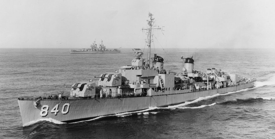 The U.S. Navy destroyer USS Glennon (DD-840) underway in June 1948.